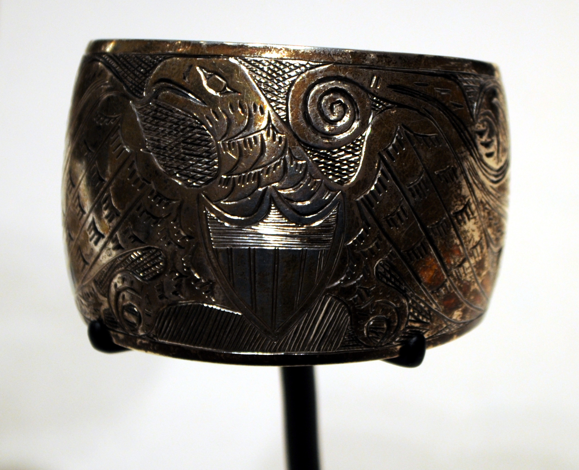 Silver bracelet